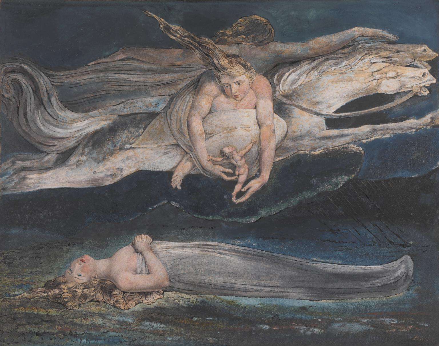 Pity